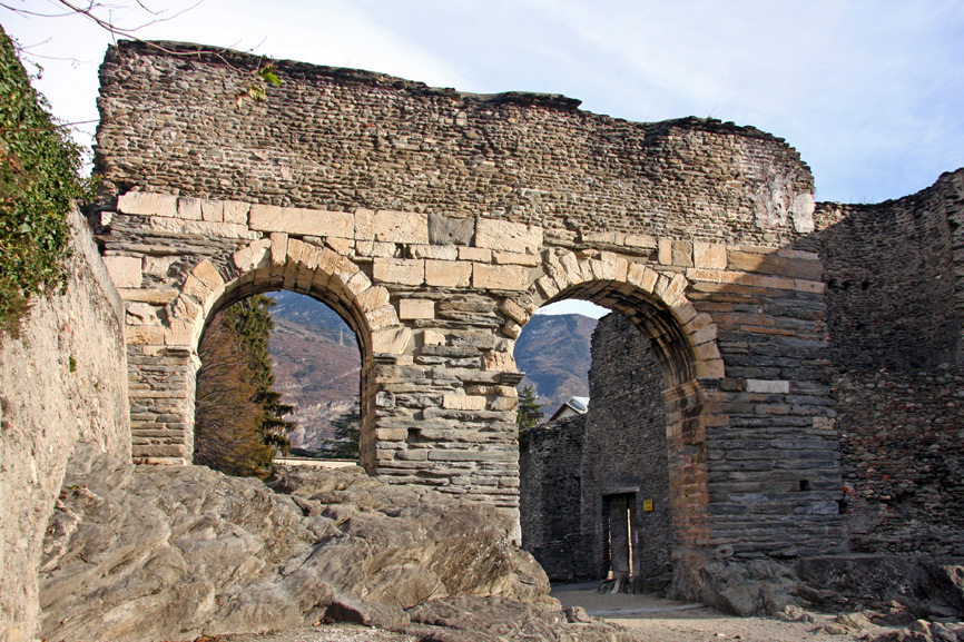 Resti dell'acquedotto romano di Susa (TO)